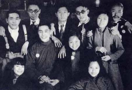 1933年金焰和王人美在联华影业公司辞旧迎新晚会上的结婚照